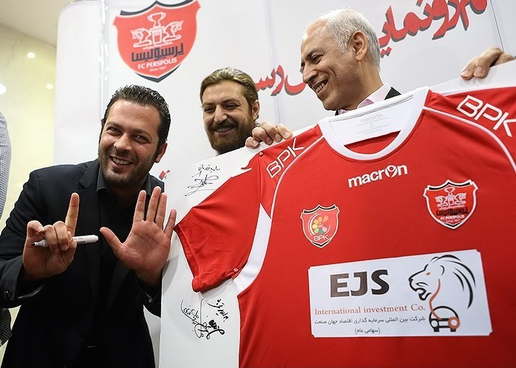 رونمایی از لباس پرسپولیس